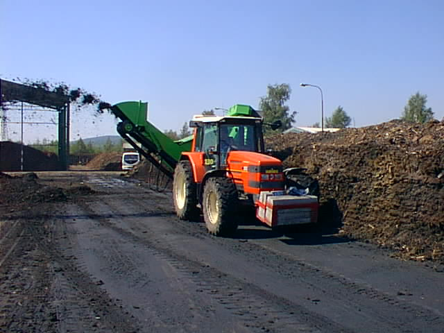 Boční frézový překopávač na kompostárně Pitterling u Bíliny, zdroj: Biom.cz, autor: Antonín Slejška